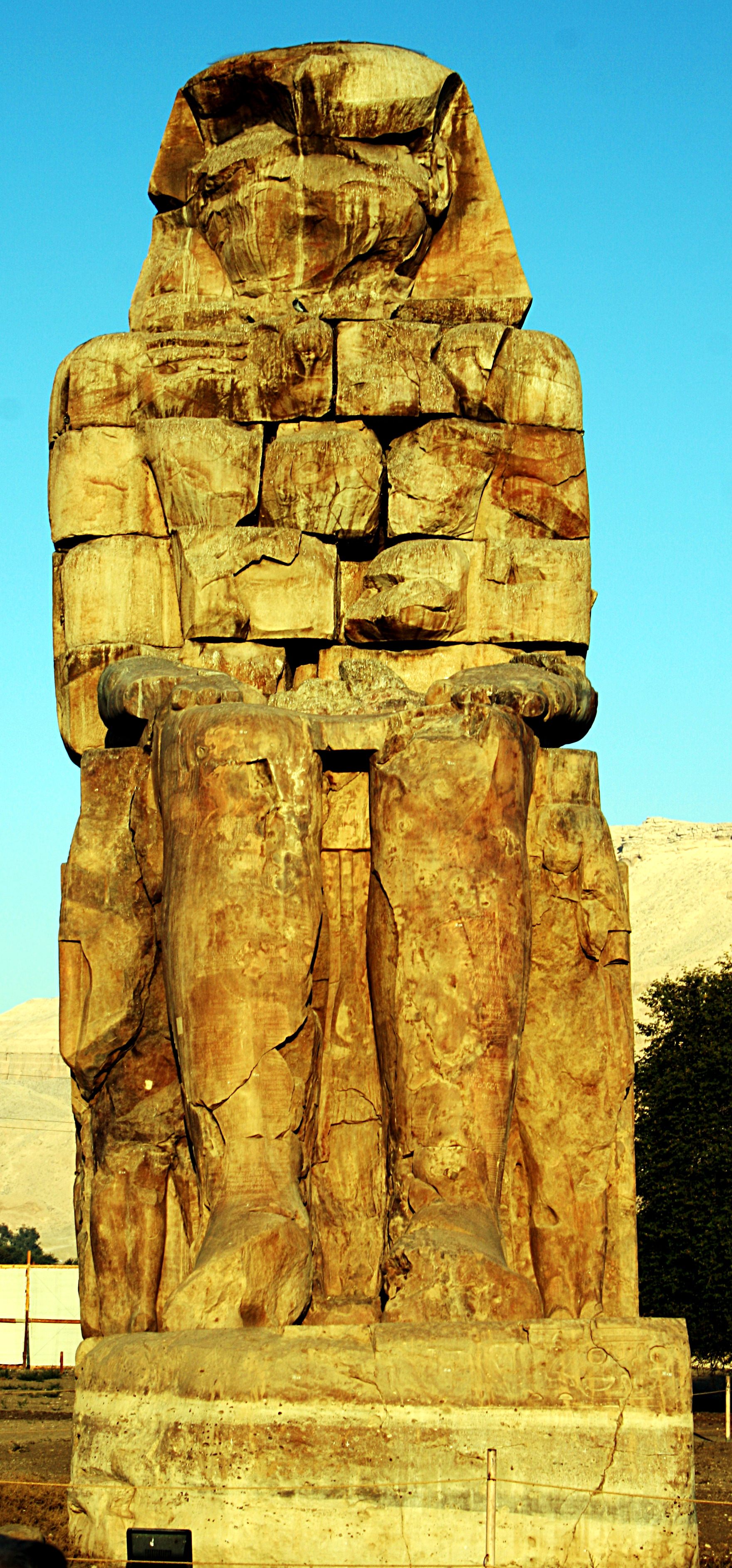 Memnonkolosse